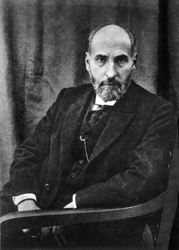 Santiago Ramón y Cajal, Nobel Prize in Medicine 1906